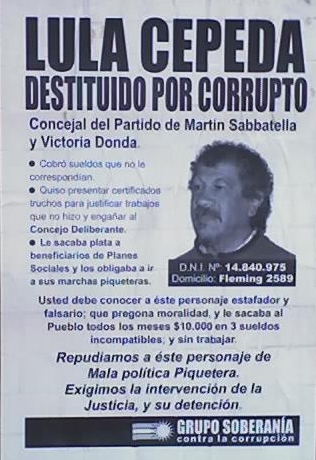 Panfletos contra el concejal Cepeda, Merlo, Provincia de Buenos Aires.